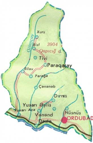 Dəstə kəndini Ordubad rayonunda yeri